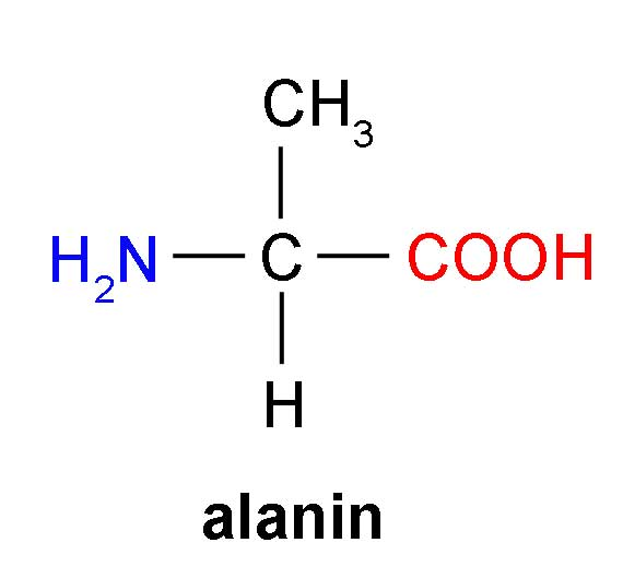 Self created.